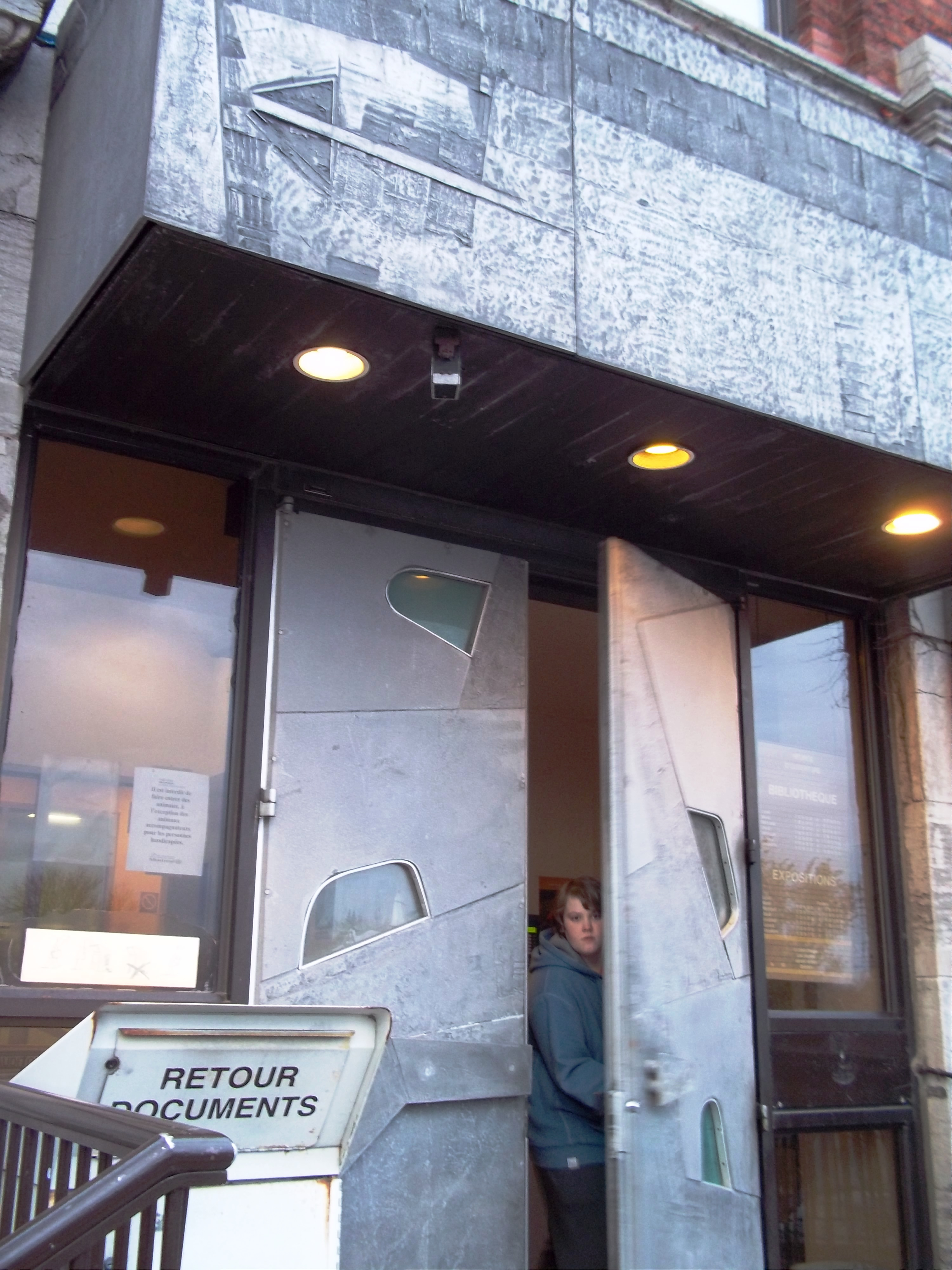 Porte d'entrée, Maison de la culture, Bibliothèque de Notre-Dame-de-Grâce, 3755, rue Botrel, Montréal